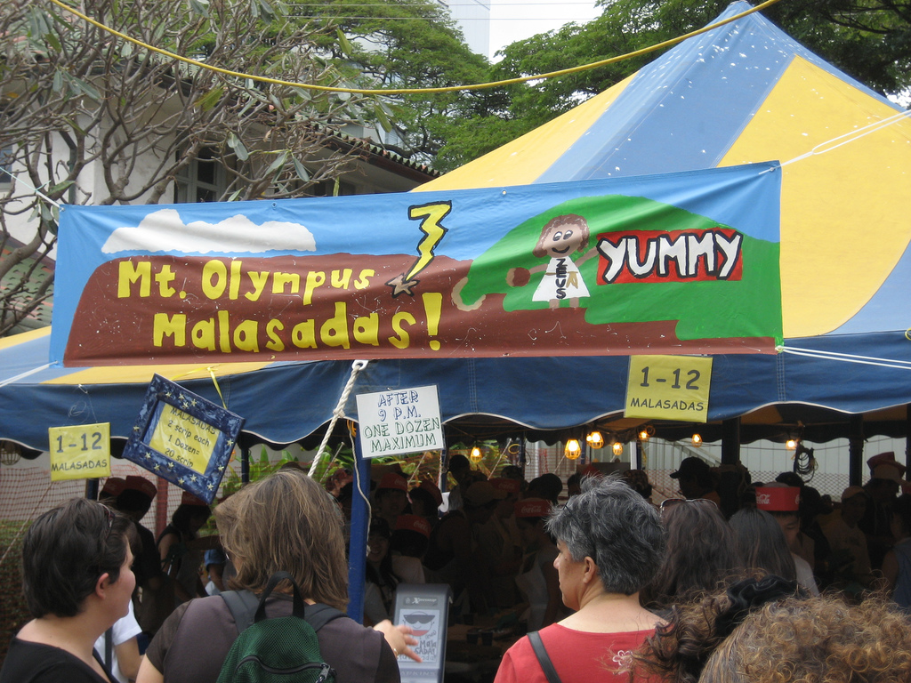 (Punahou School Carnival) Hot malasadas... mmm!